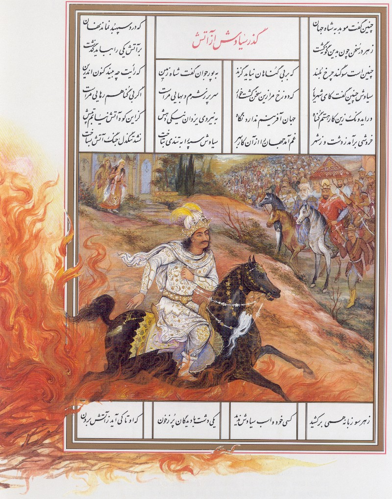 Siyāvash passant à travers le feu sur son cheval Shabrang pour prouver son innocence.